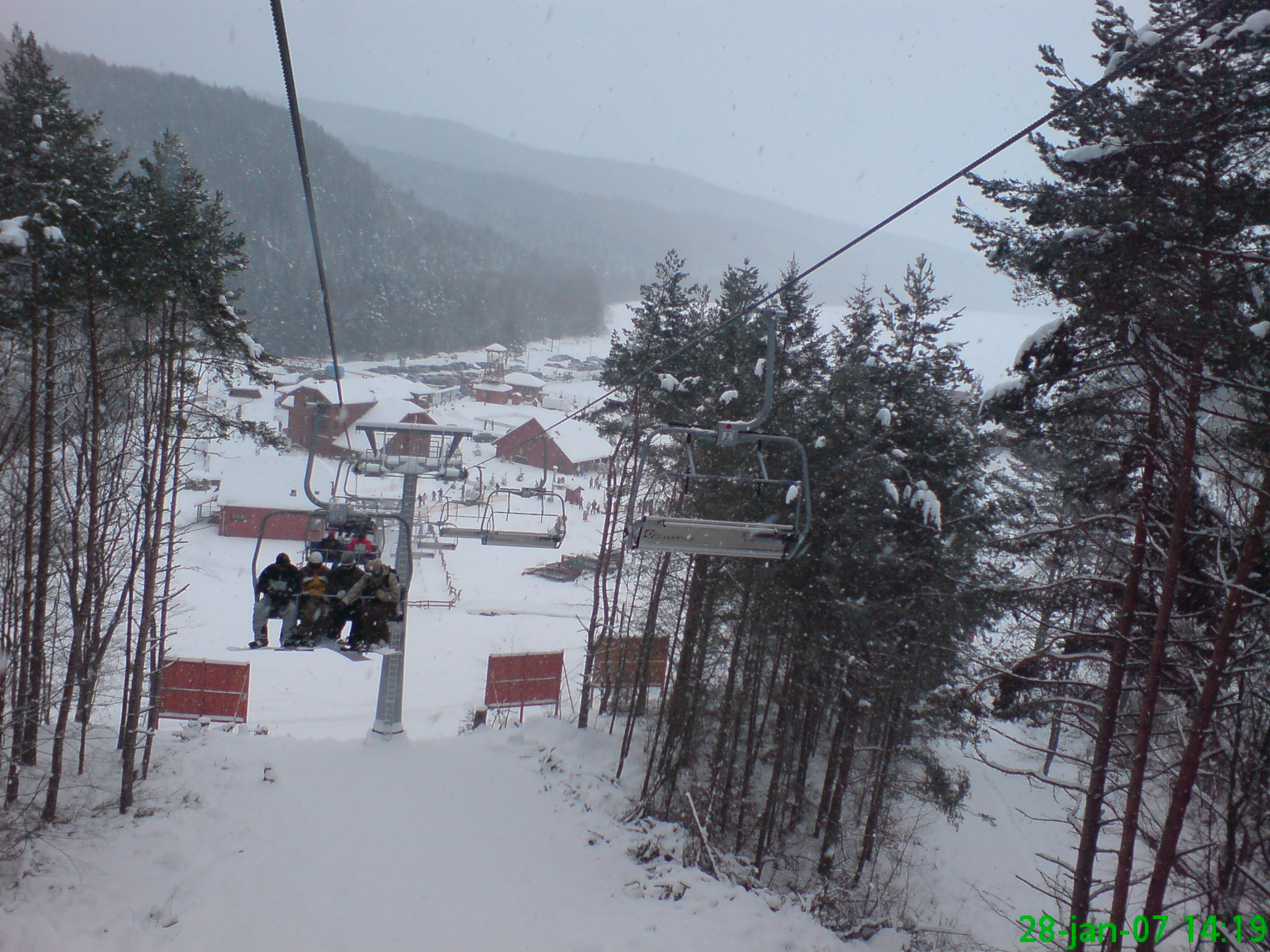 Valčianska dolina